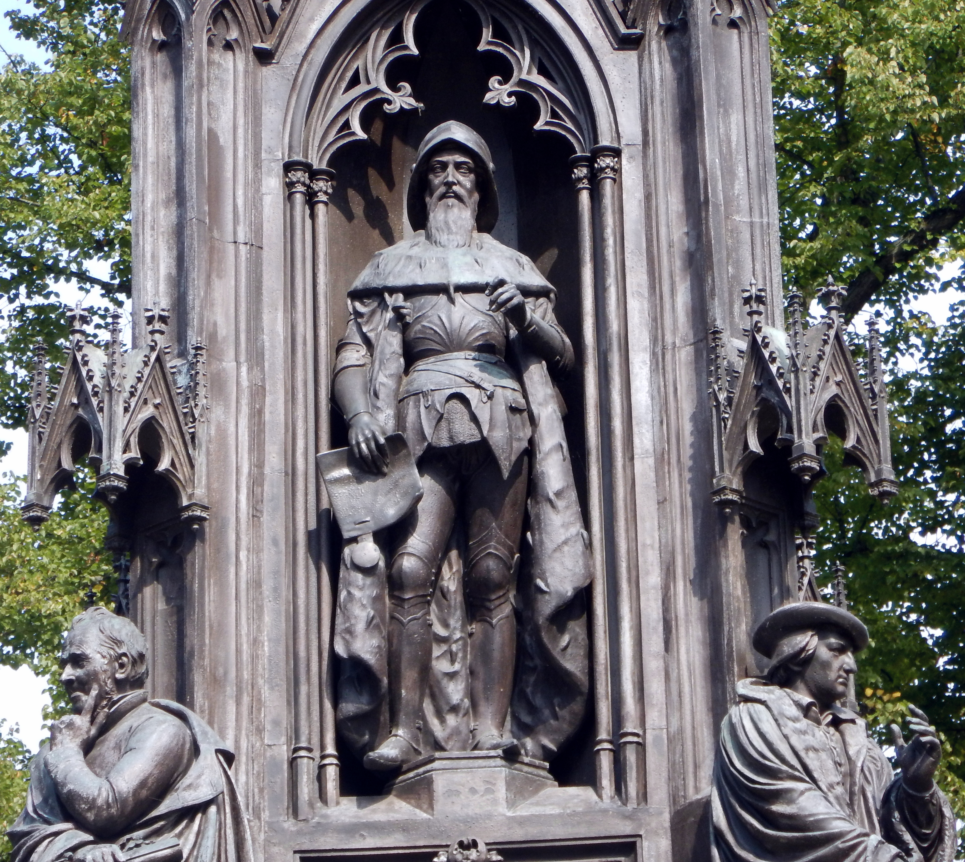 Statue von Wartislaw IX. von Pommern am Rubenowdenkmal.